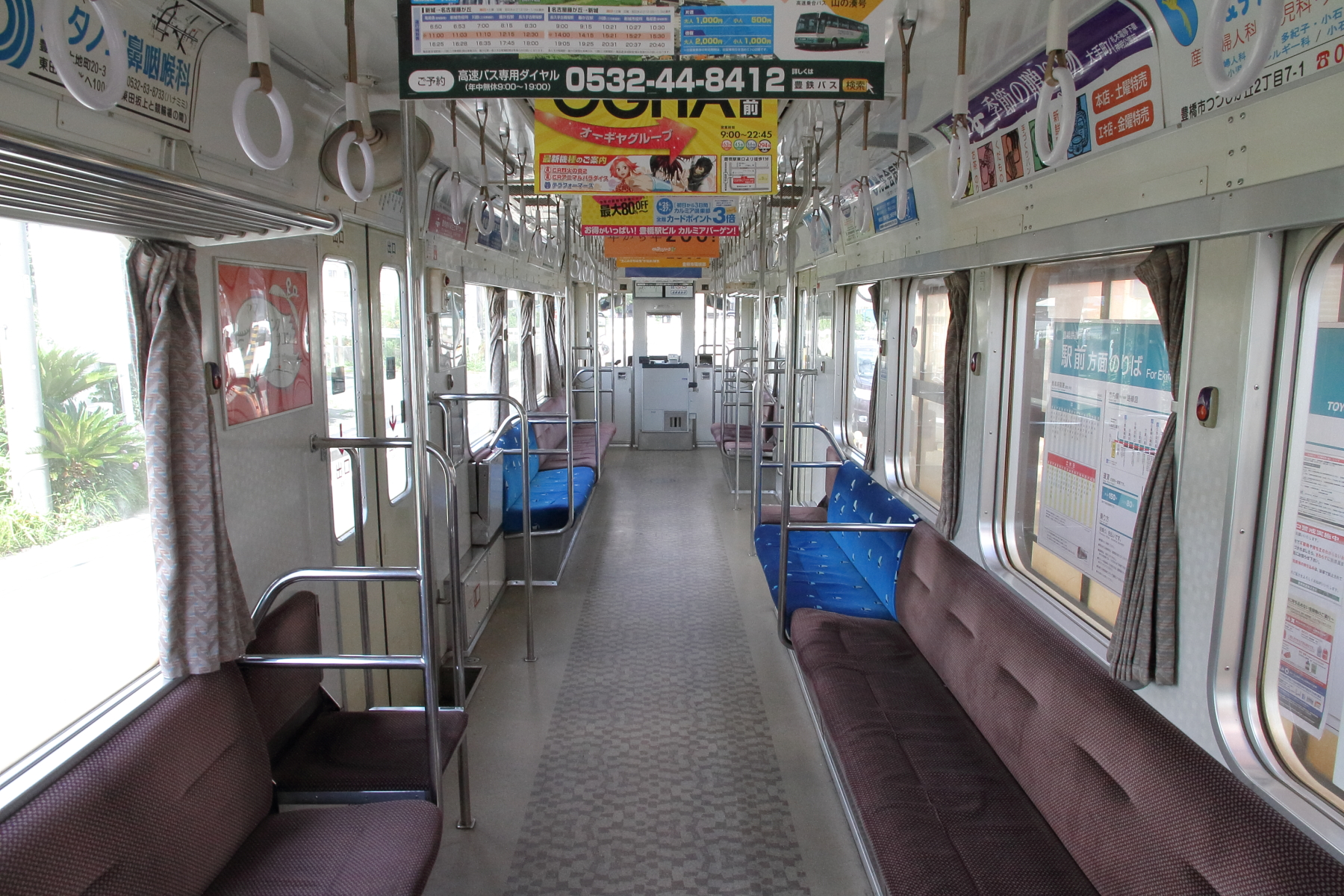 豊橋鉄道モ780形783の内装